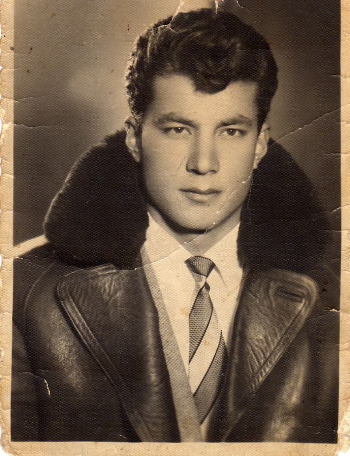 Halis Erenoğlu, Emirdağ türkülerinin babası